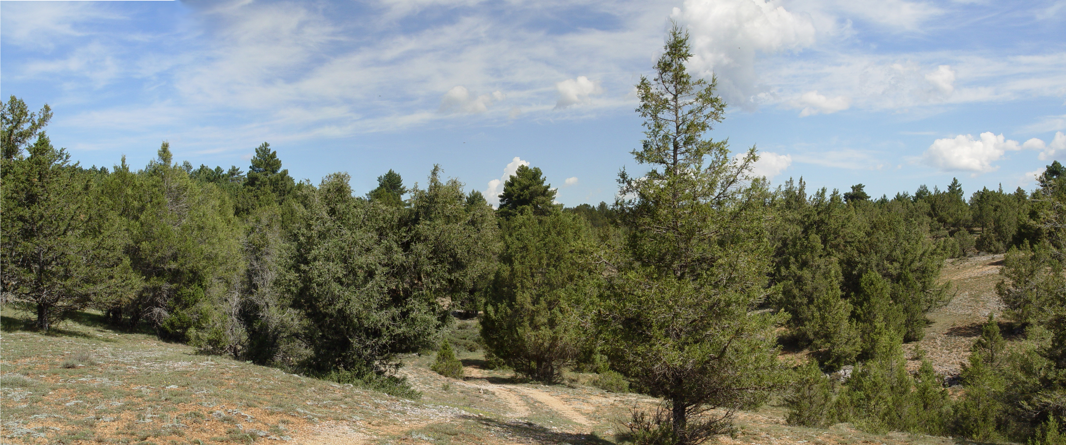 Vista del paraje de Herrera de Soria llamado: "El Enebral"